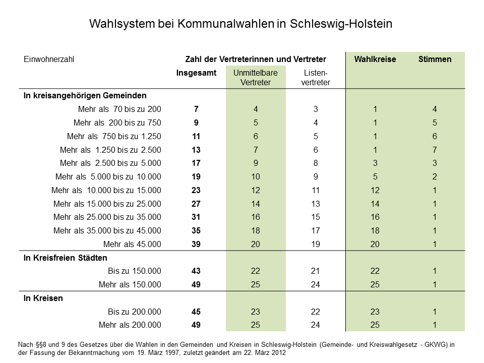 Kommunalwahlsystem Schleswig-Holstein, Gesetzesstand 2012